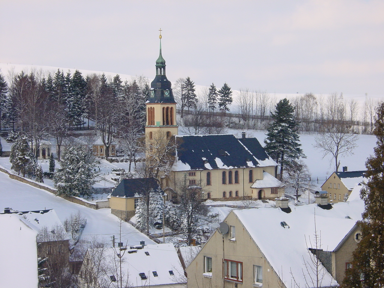 Himmelfahrtskirche in Cranzahl (Erzgebirge) am 24.02.2001 foto by geme